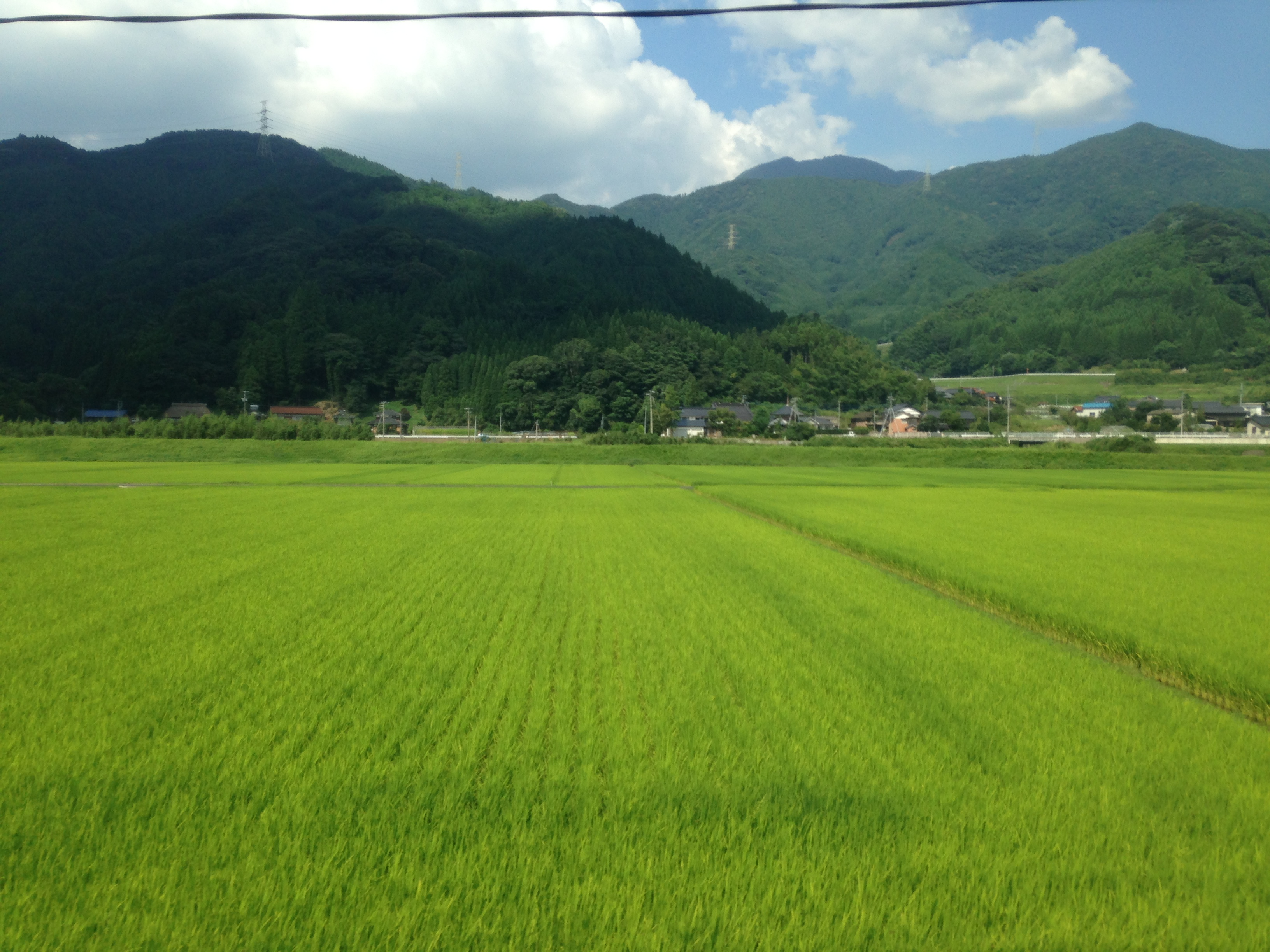 相知-岩屋間の唐津線列車内より望む作礼山と田園風景